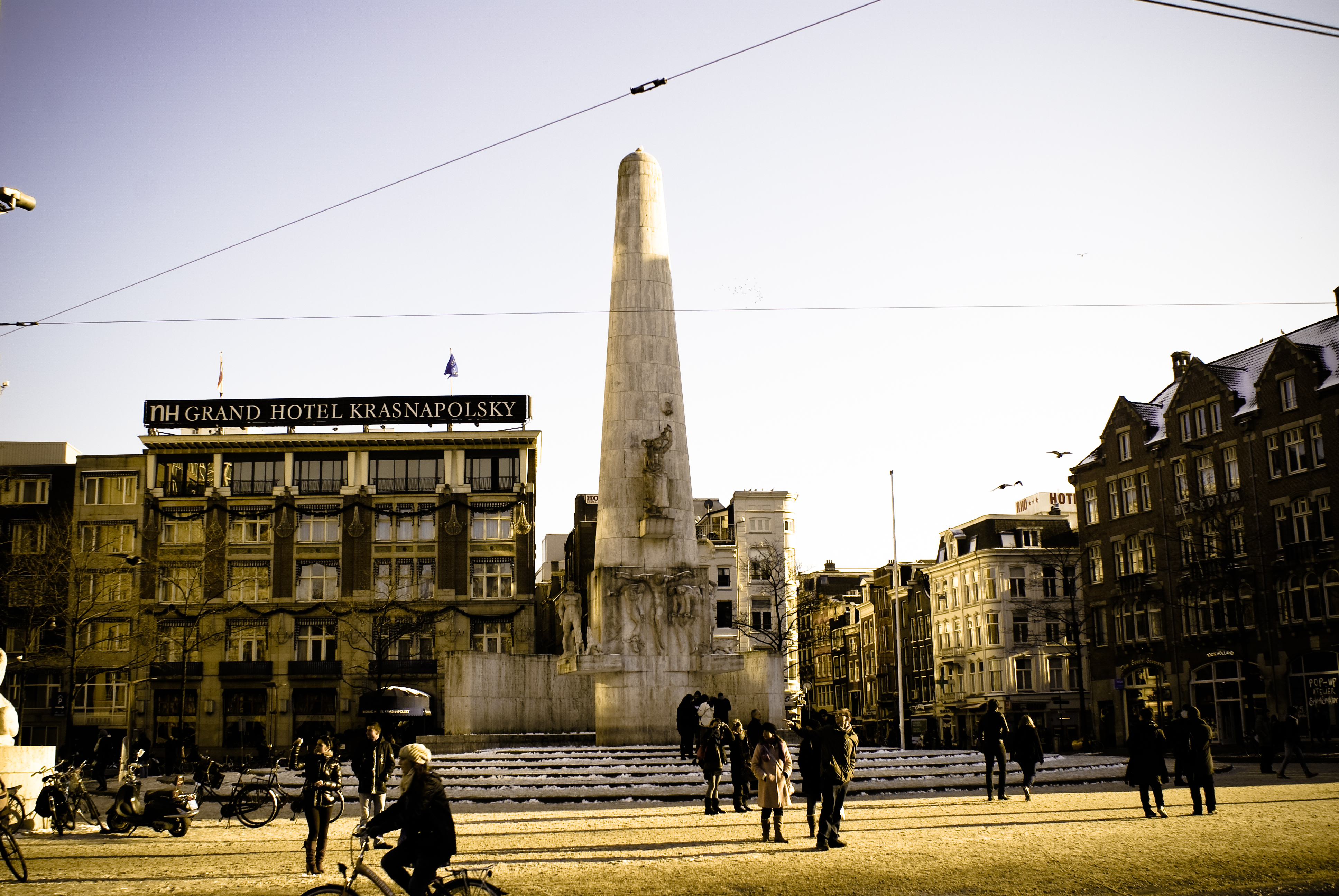 Monumento Nacional23